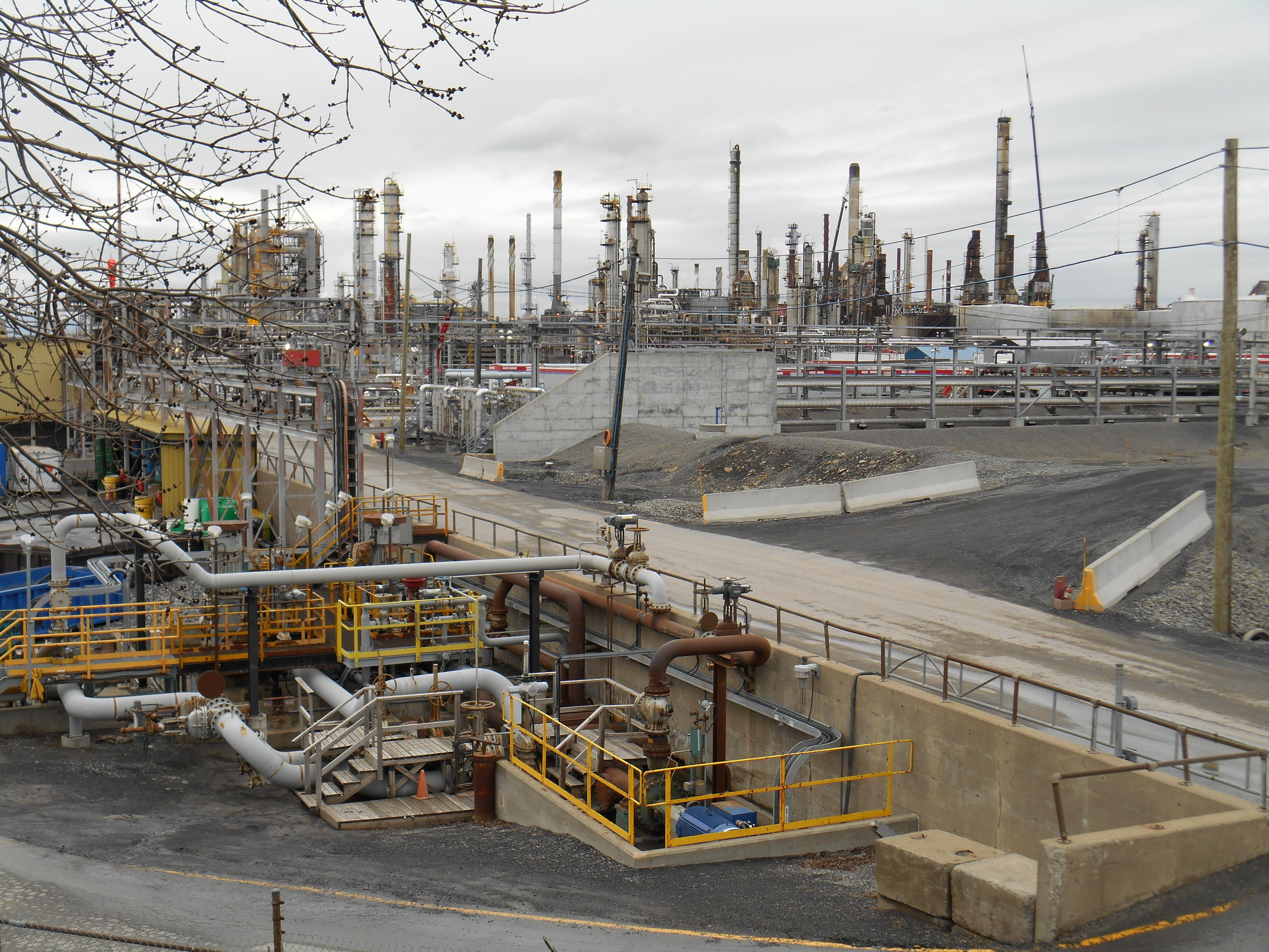 Suncor Énergie possède une raffinerie à Montréal-Est produisant 137 000 barils par jour d’essence, de distillats, de bitume, de mazout lourd, de produits pétrochimiques, de solvants et de charge d’alimentation pour lubrifiants.